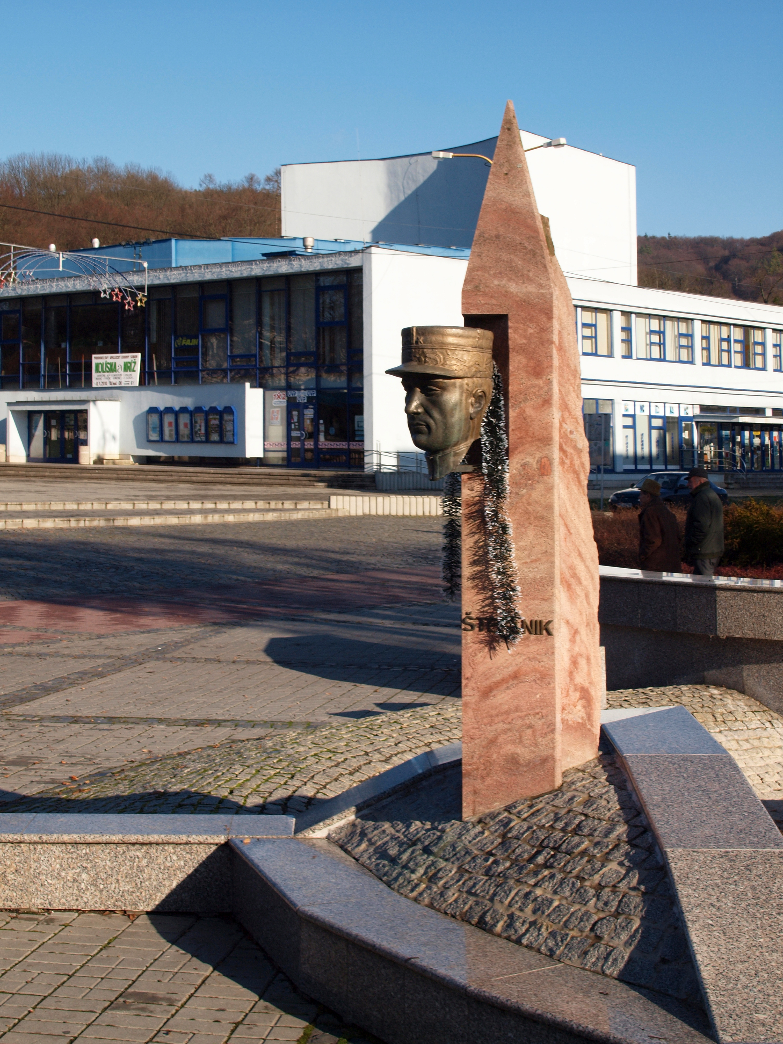 Humenné (Slovakia) - Stèle du Général Milan Rastislav Štefánik